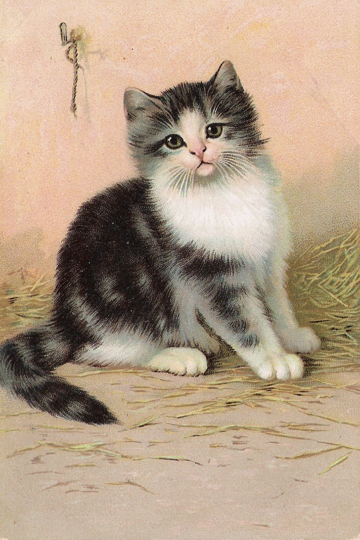 Schwarz-Weiß-Druck nach einem Gemälde einer Angorakatze